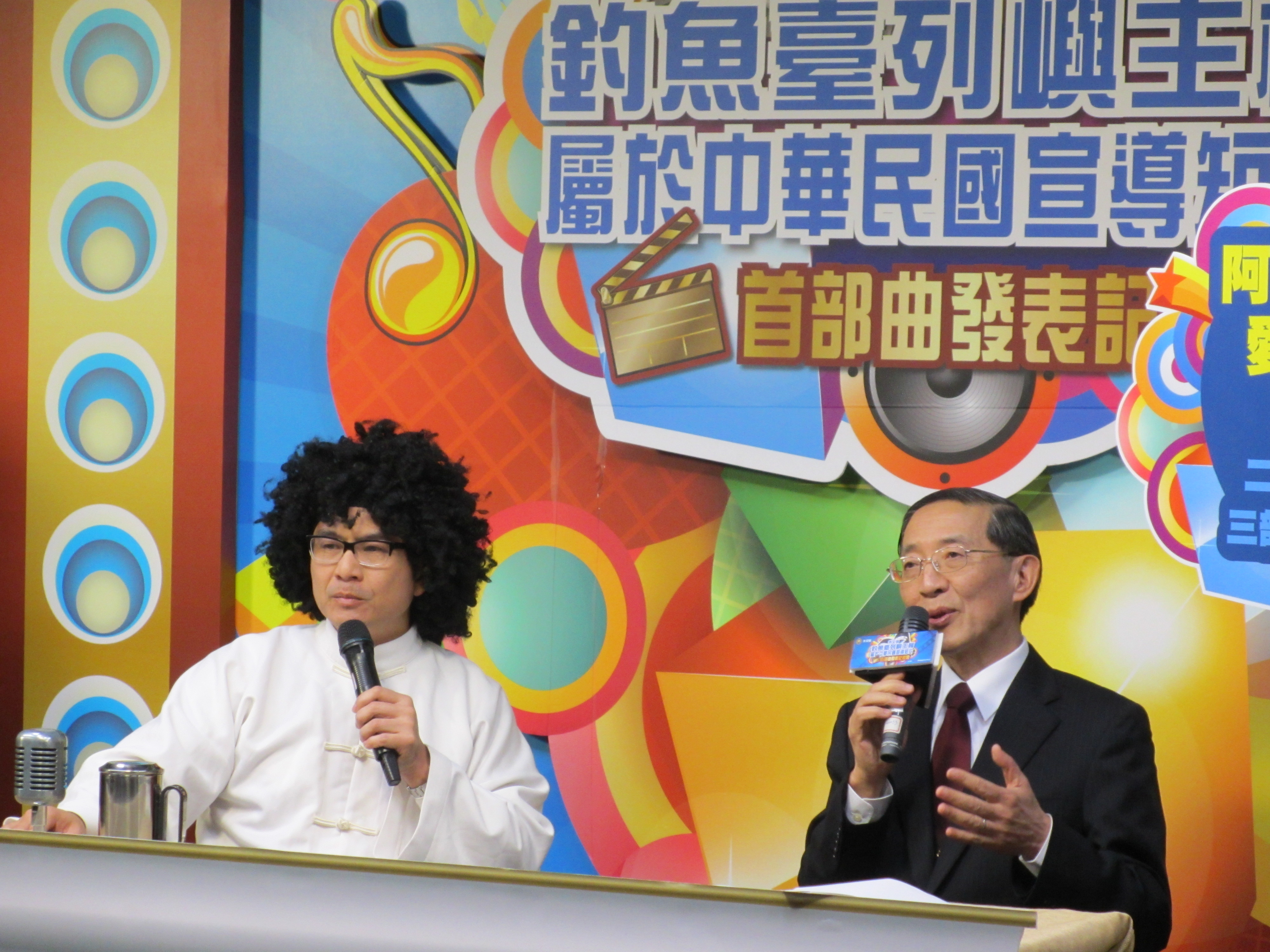 中華民國外交部「釣魚臺列嶼主權屬於中華民國」宣導短片首部曲發表記者會，外交部部長林永樂（右）與藝人洪都拉斯（左）對談。